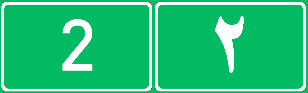 علامت جاده شماره ۲ عراق